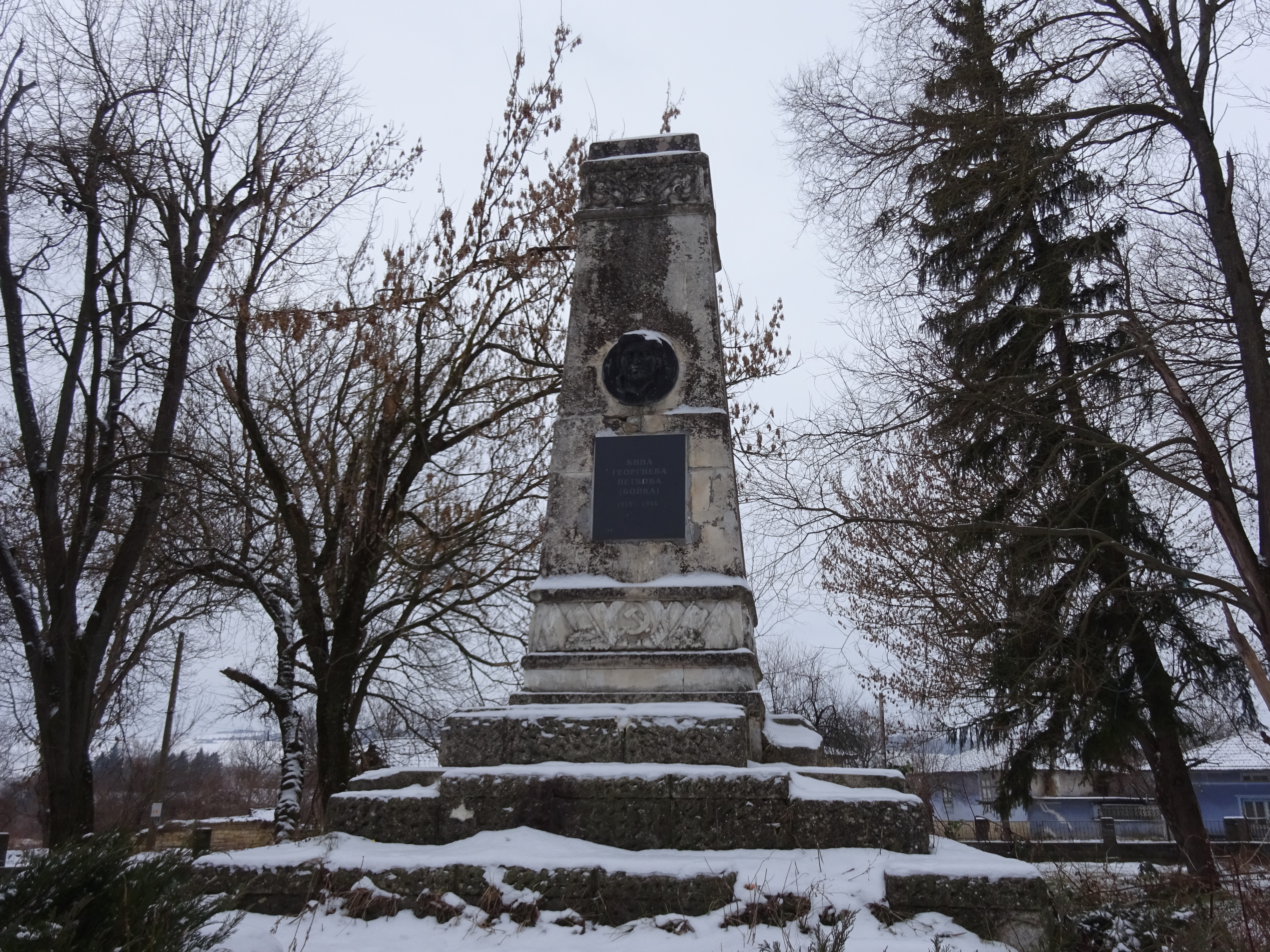 Паметник на Кина Георгиева Петкова, с. Лом Черковна